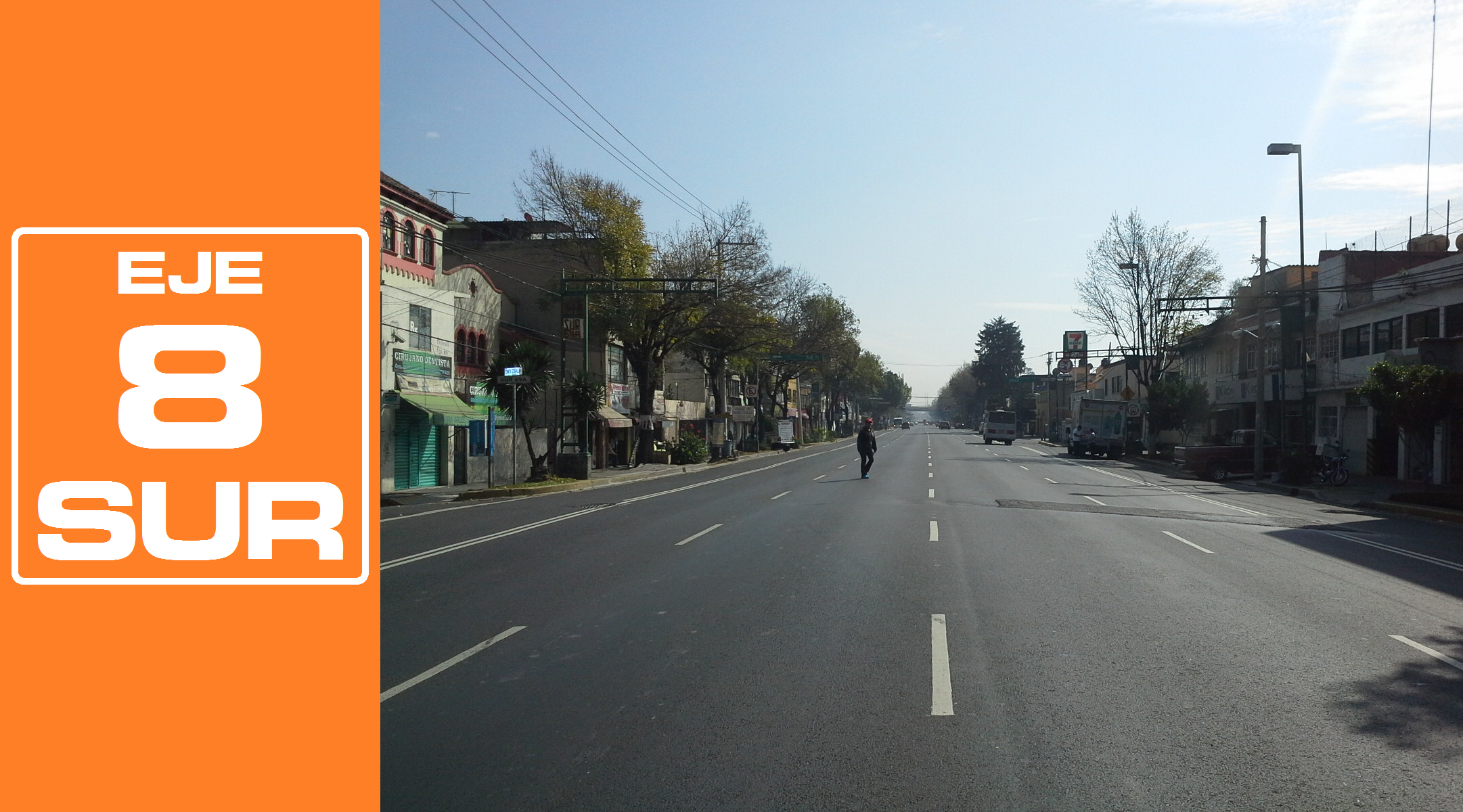 Rediseñado original de la señalética de los Ejes viales de la Ciudad de México por José García (Wiki ID: narumiyama)